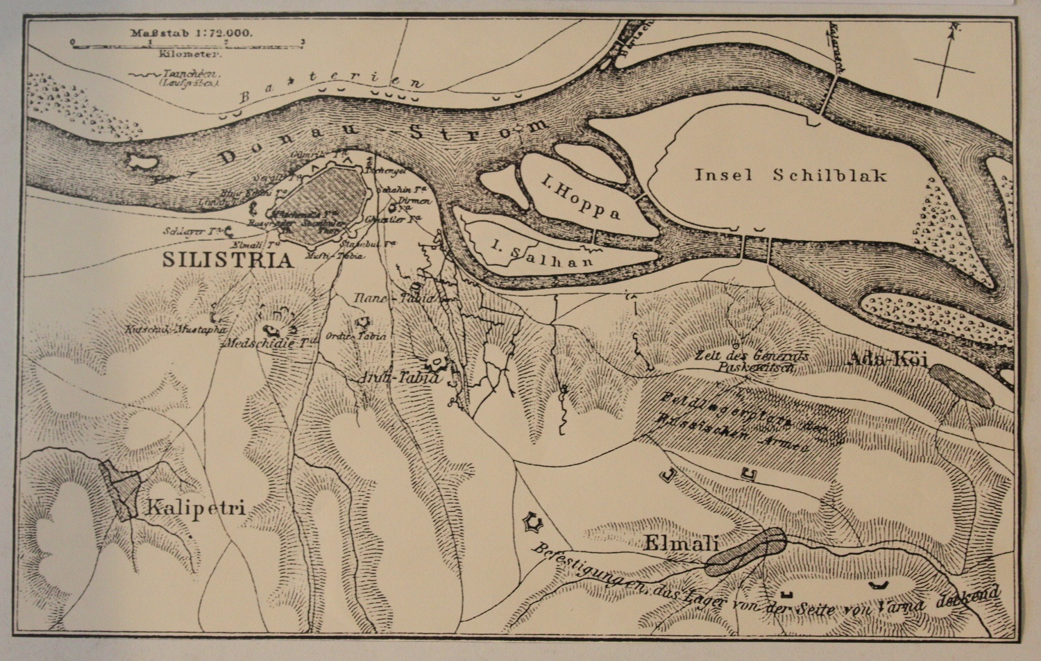 Lageplan der russischen Belagerung